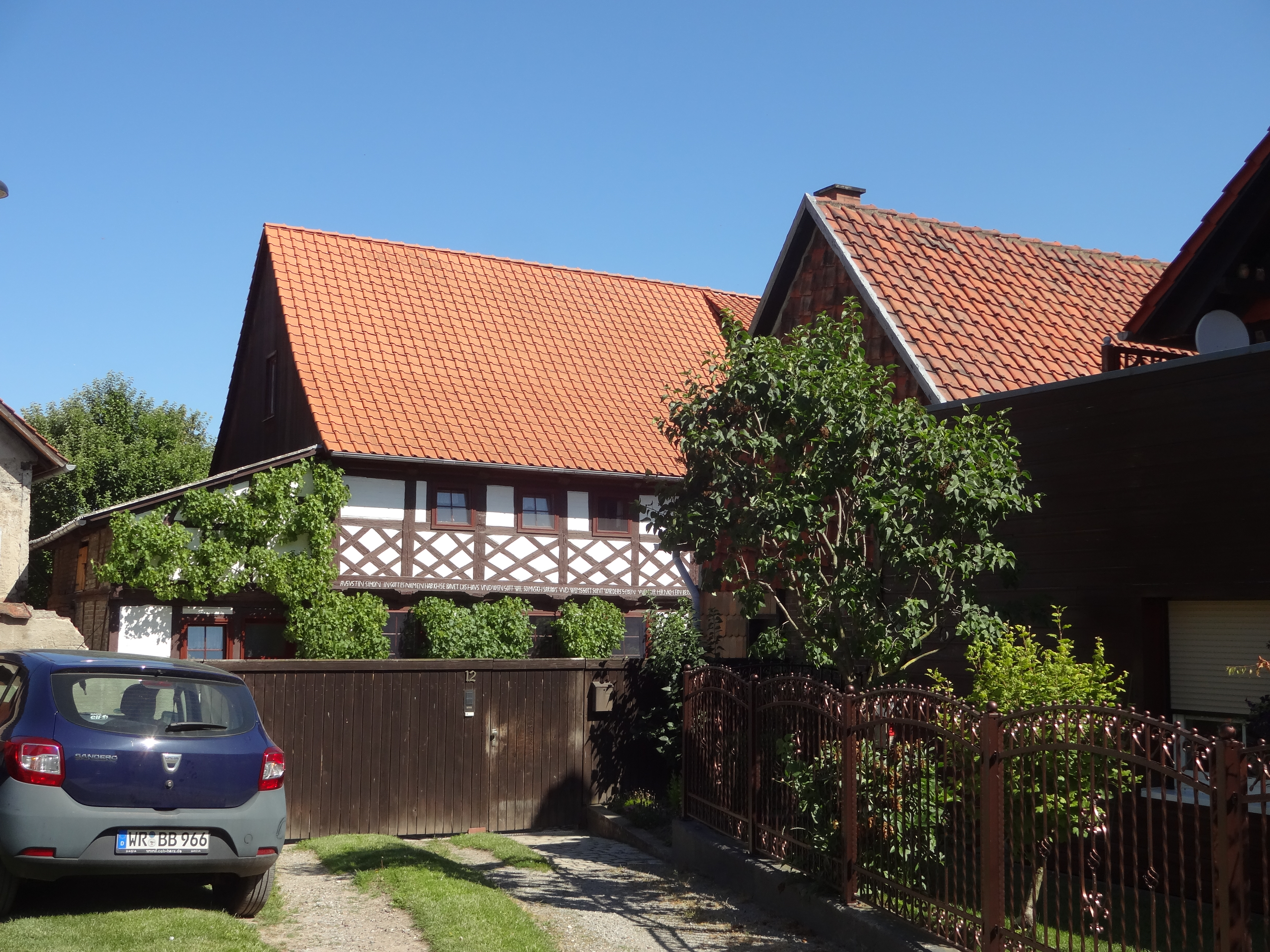 denkmalgeschützter Bauernhof in der Straße Neustadt 12 in Langeln, Gemeinde Nordharz